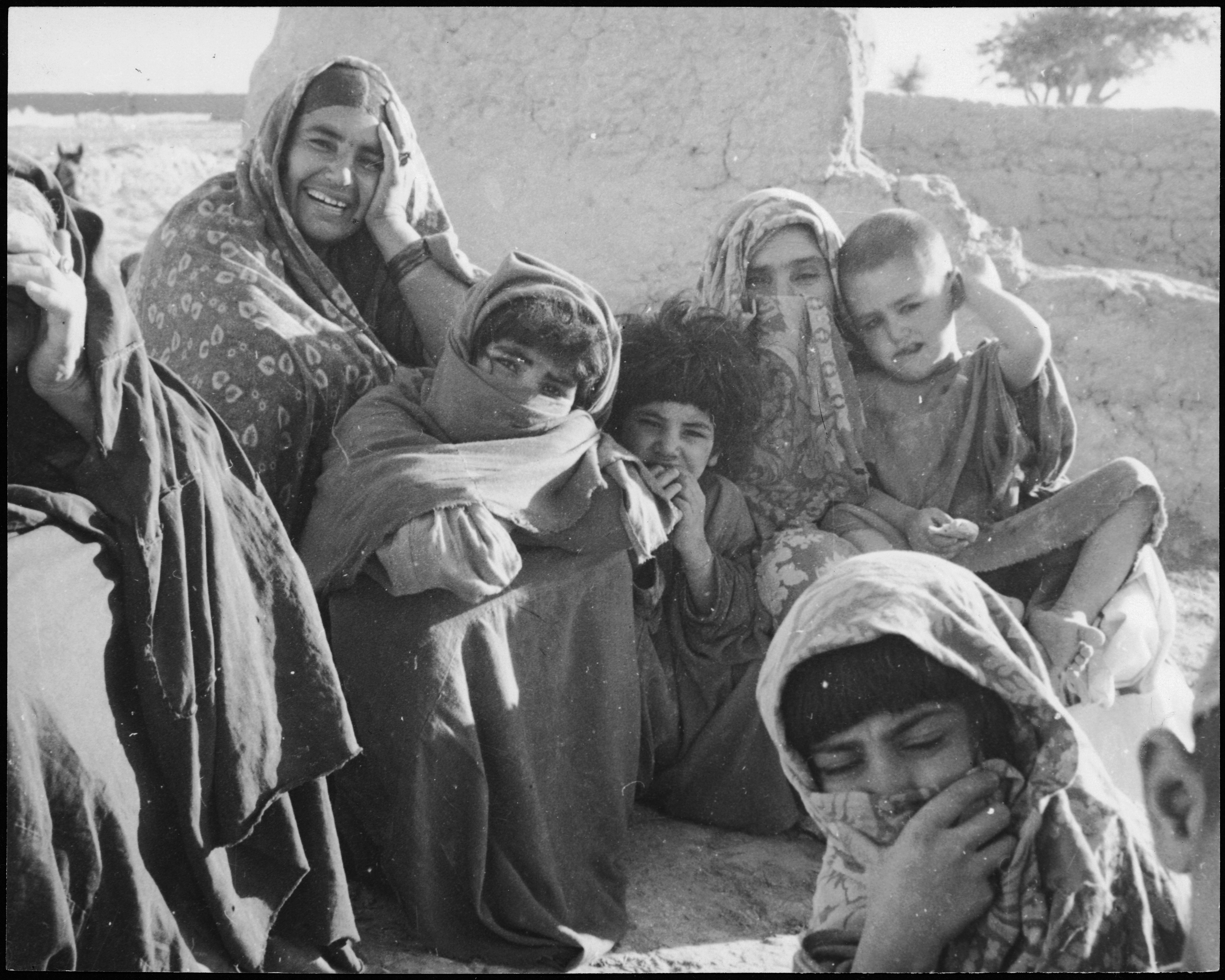 Afghanistan, Kulm (Khulm, Kholm): Menschen; Sitzende Frauen und Kinder in einem Dorf